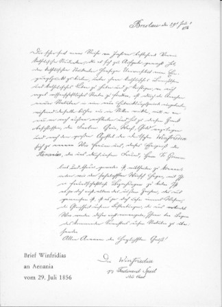 KDStV Winfridia Breslau Münster, Facsimile